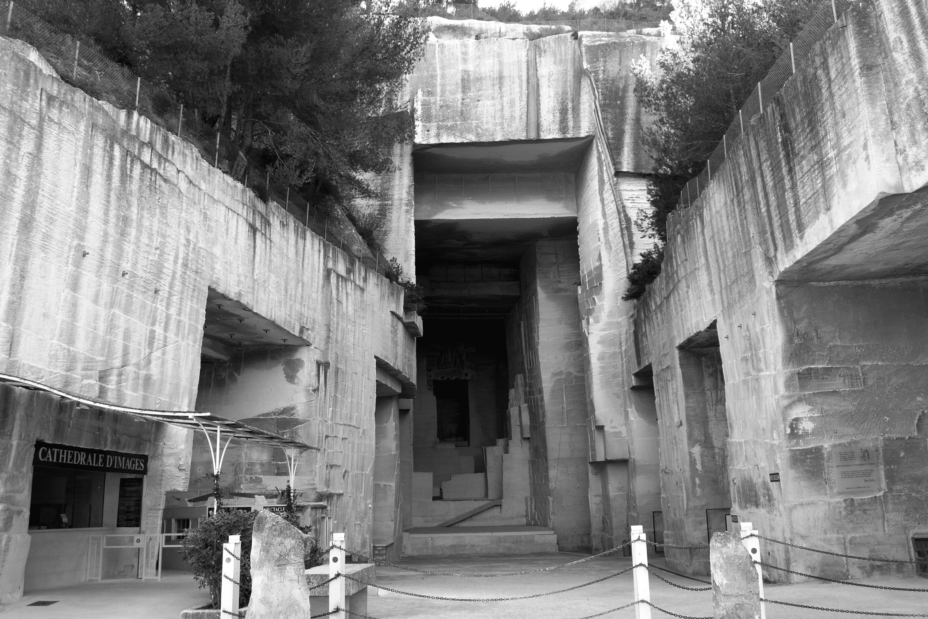 Cathédrale d'images près des Baux de Provence